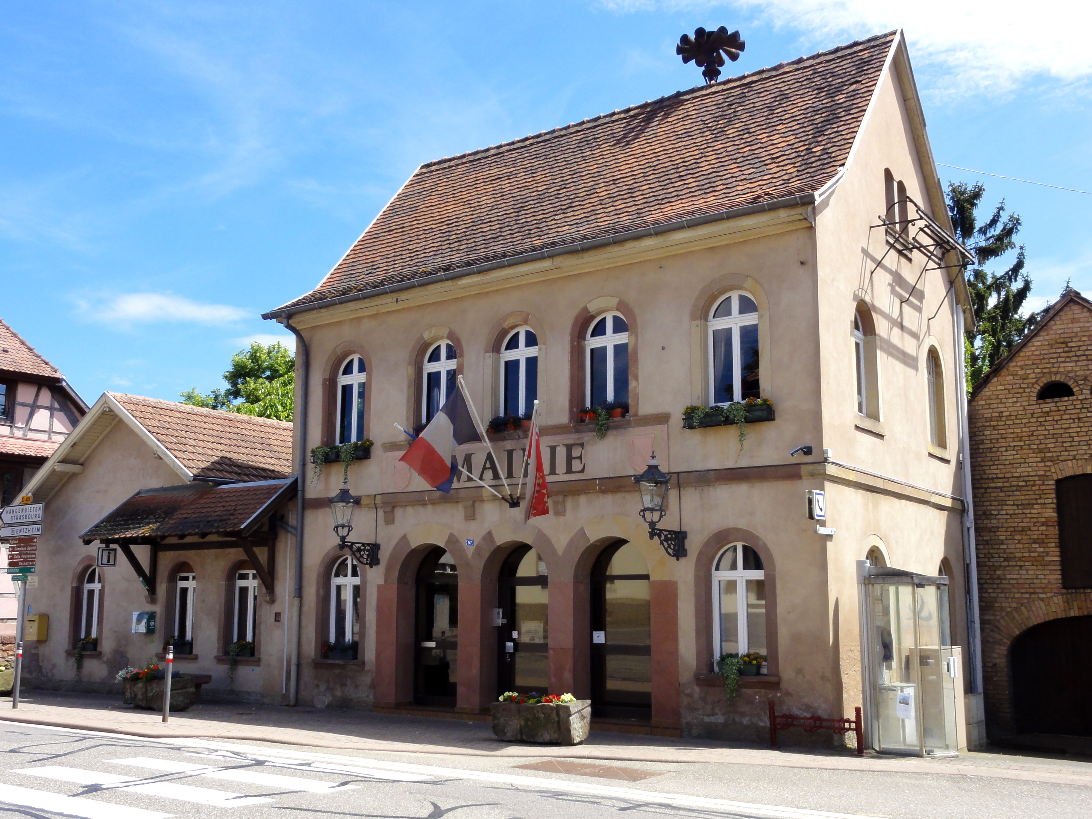 Alsace, Bas-Rhin, Breuschwickersheim, Mairie (1845), 57 rue Principale. .